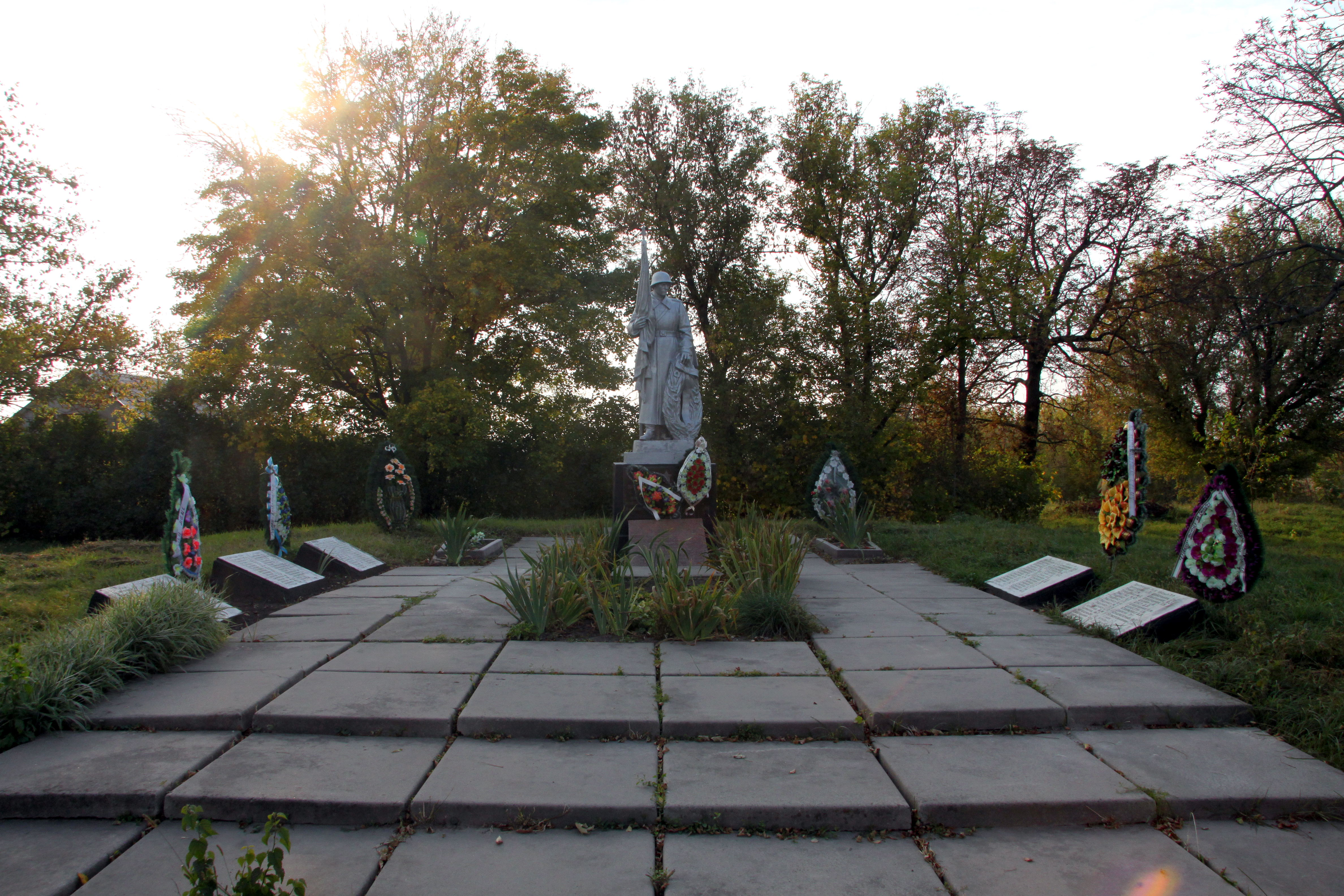 Пам'ятник воїнам-визволителям та воїнам-односельчанам, біля школи, село Велика Мотовилівка